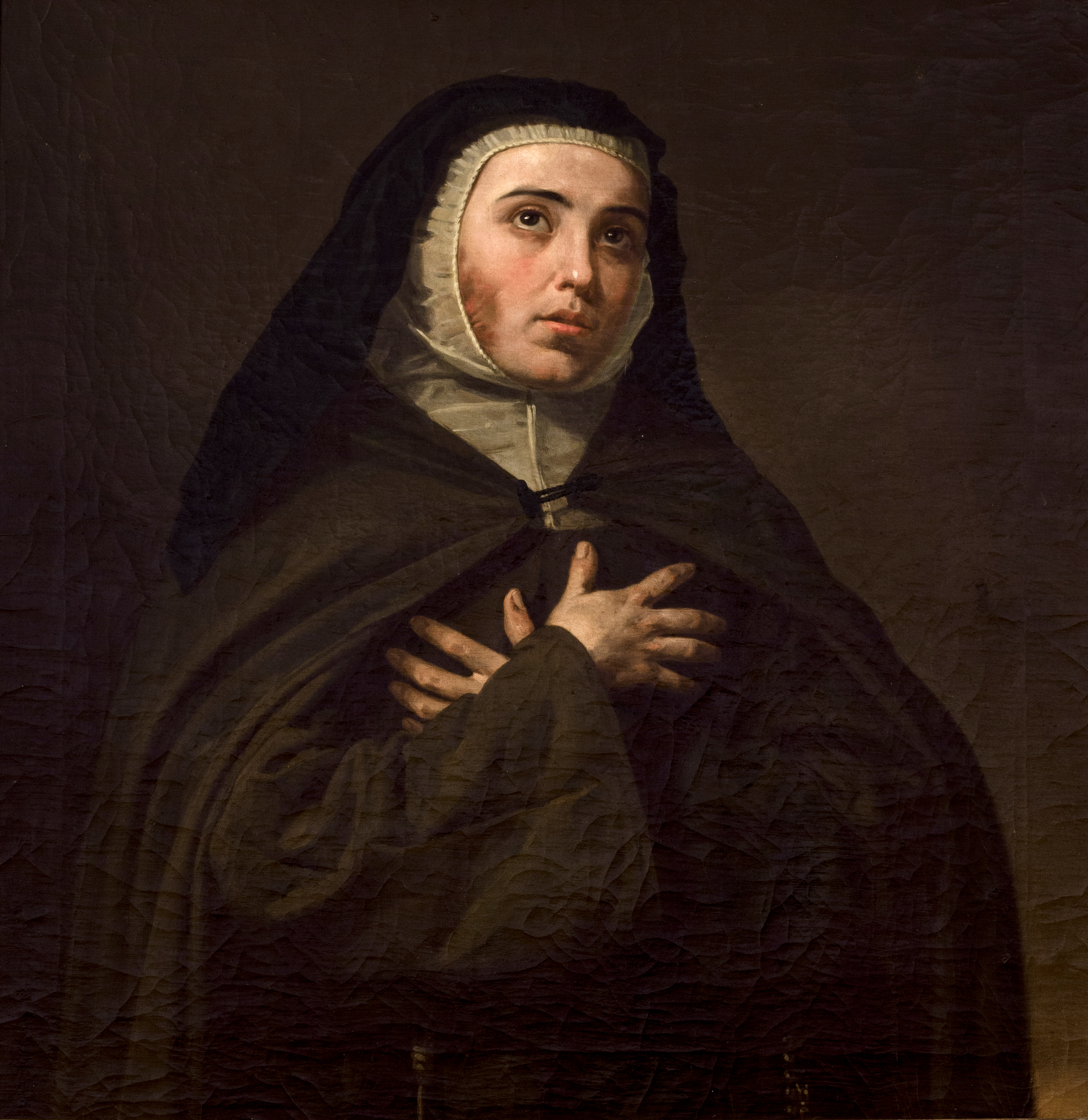 Retrato de la célebre dama María Fernández Coronel (1334-1409), que fue ejecutado por el pintor Joaquín Domínguez Bécquer, quien estuvo muy vinculado al duque de Montpensier, Antonio de Orleans, que fue quien donó esta obra junto con su esposa, la infanta Luisa Fernanda de Borbón, al Ayuntamiento de Sevilla. Y para ejecutar esta obra el artista se inspiró en el cuerpo incorrupto de la retratada, que fue beatificada el 6 de noviembre de 1834 y que aún se conserva en el convento de Santa Inés de Sevilla.